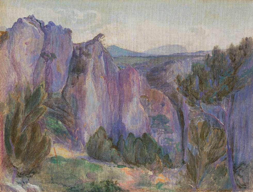 Obra del pintor uruguayo Pedro Blanes Viale (1879 - 1926) "Las grutas", óleo sobre tela de 35 x 46 cm.